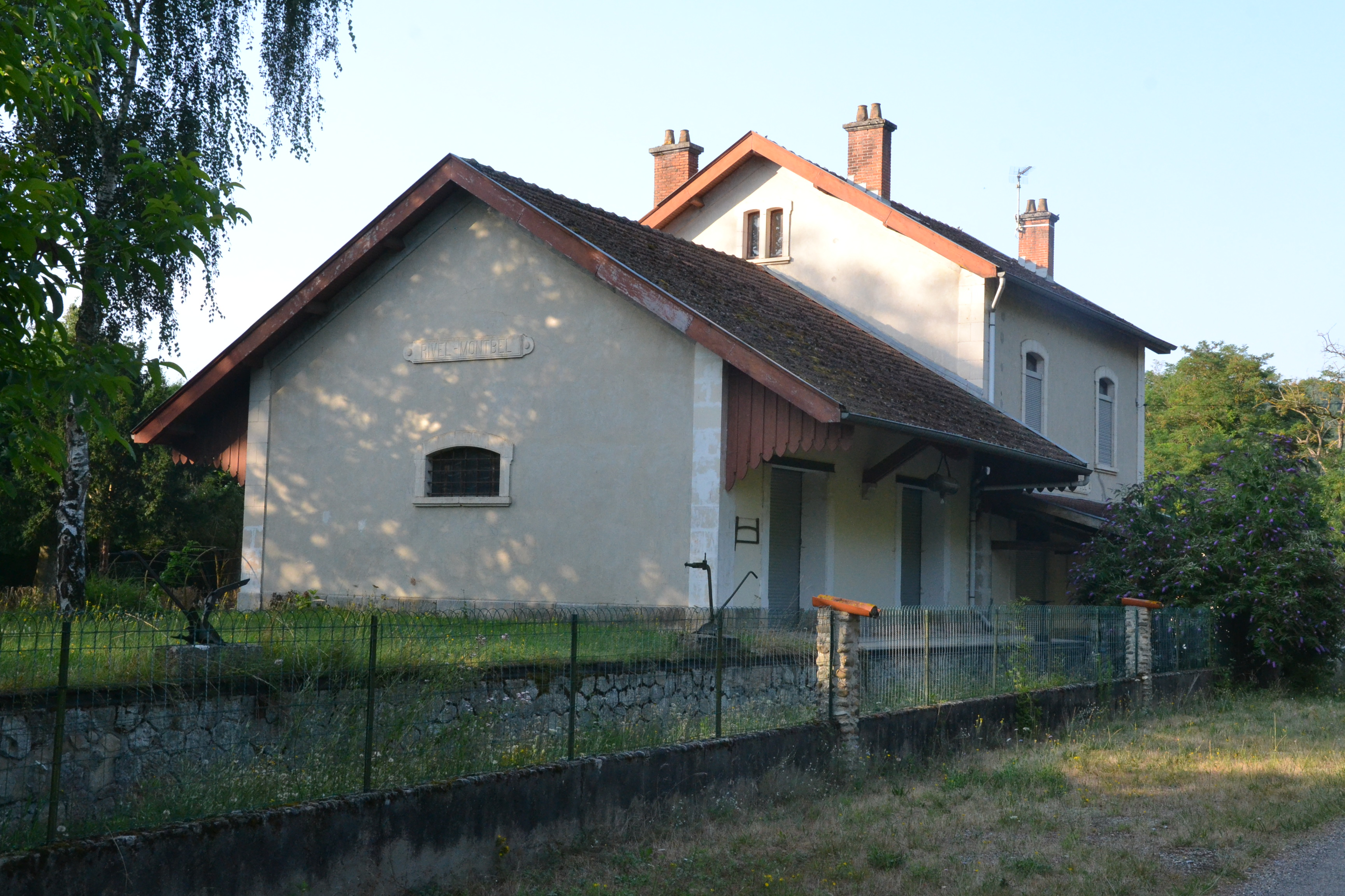 Ancienne gare ferroviaire de Rivel - Montbel (commune de Montbel, Ariège, France), sur la ligne de Moulin-Neuf à Lavelanet.